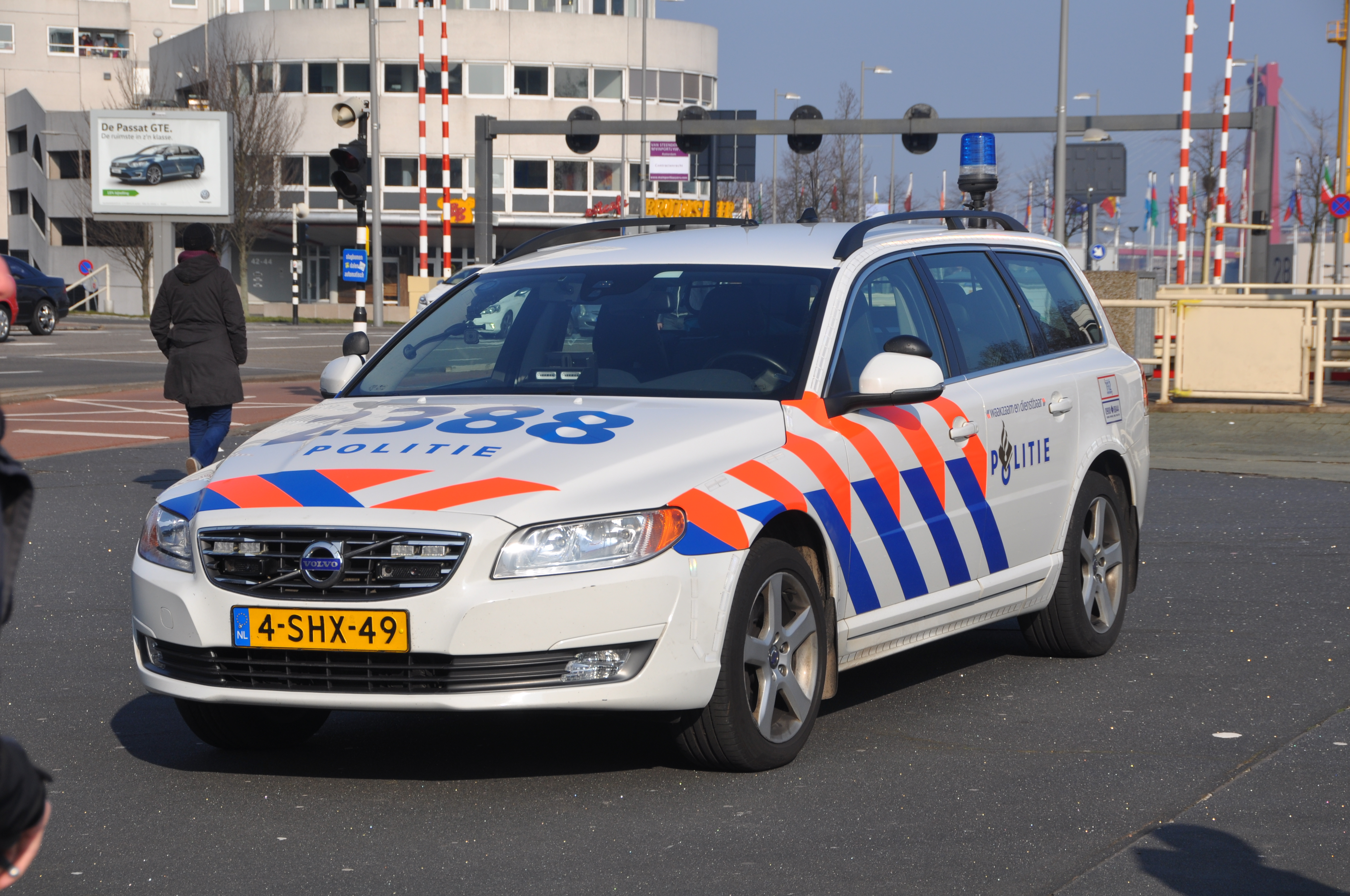 Police automobiles in Rotterdam.